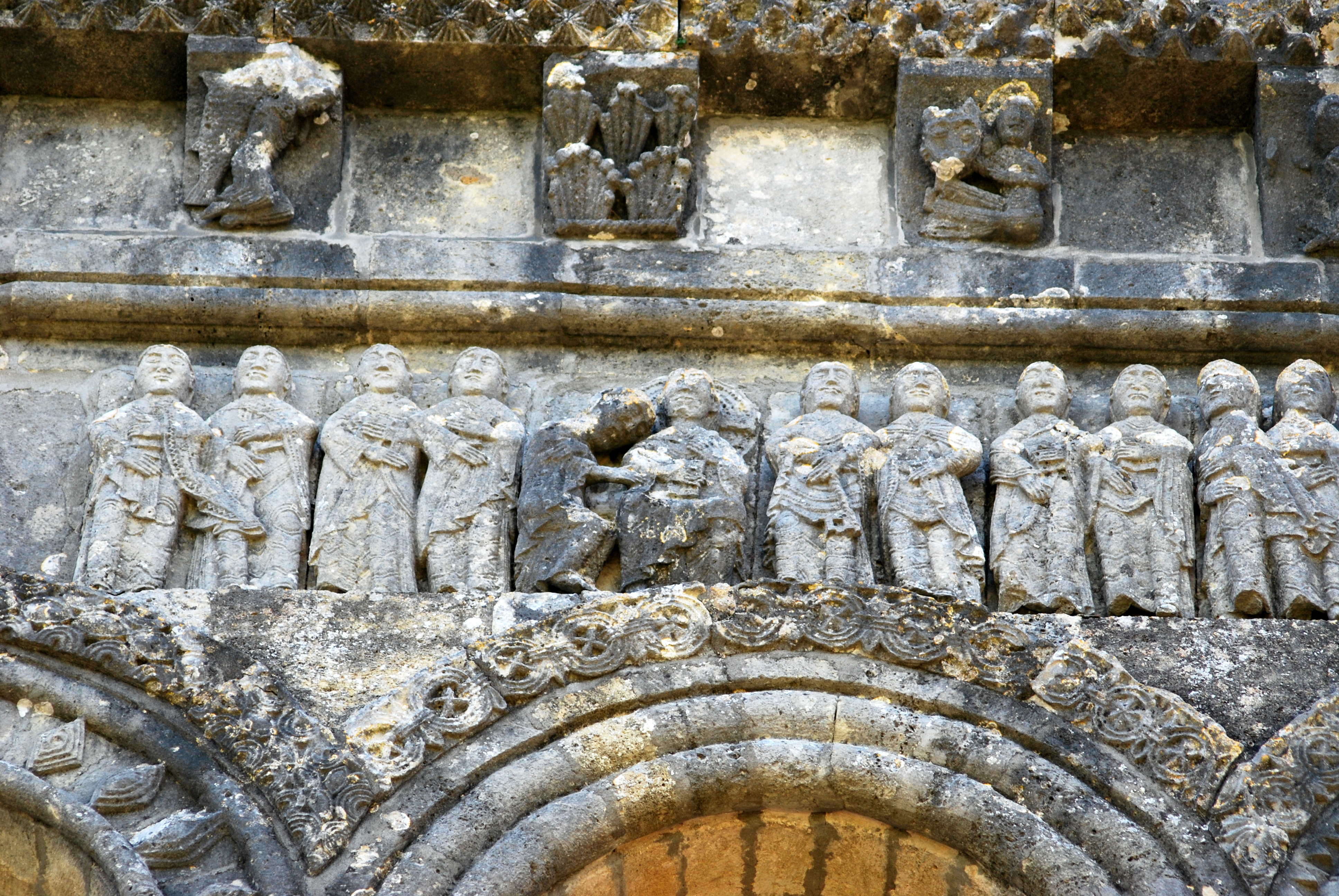 Loupiac église Saint Pierre